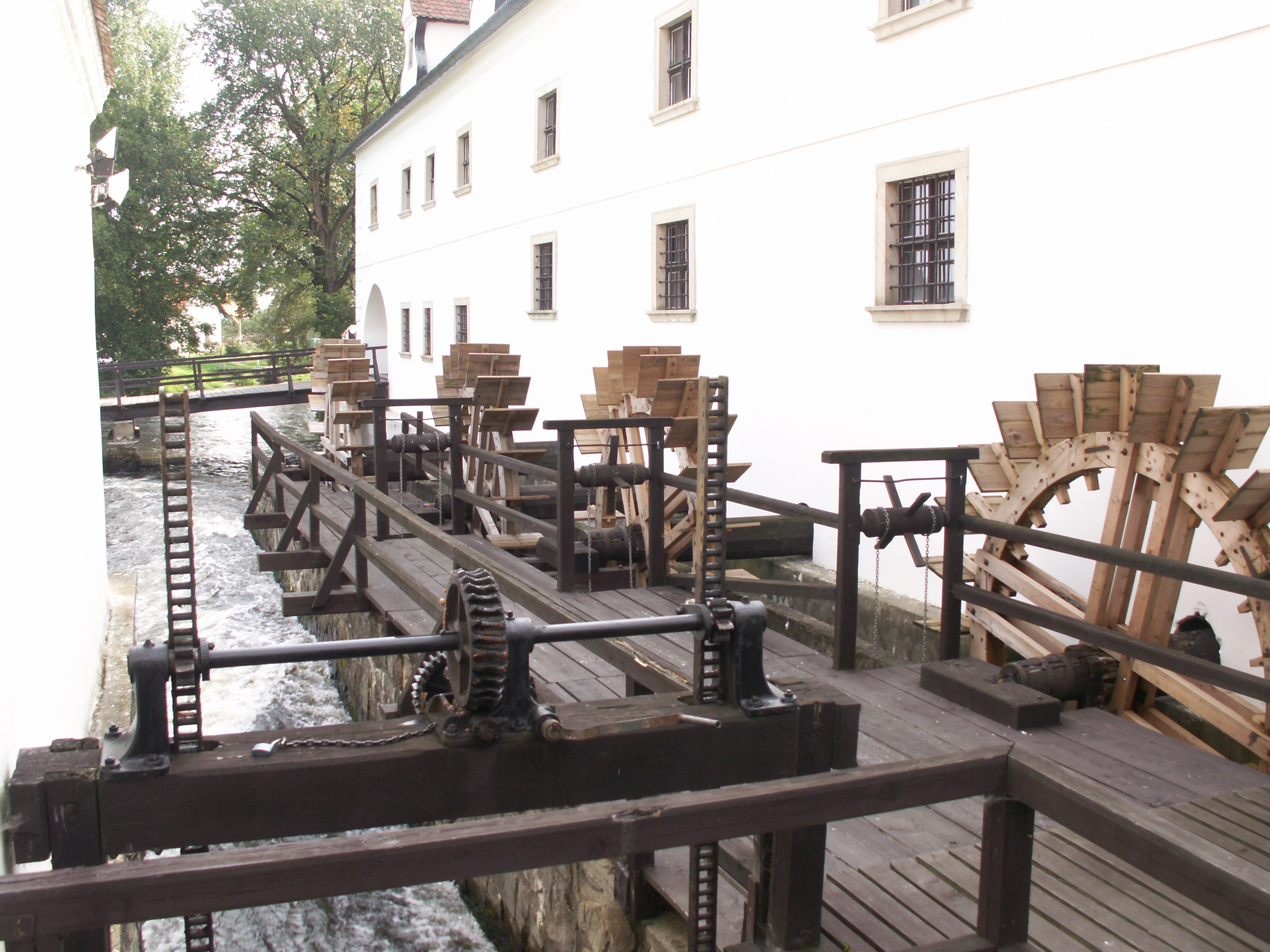 mlýnská kola vodního mlýna ve Slupi, okres Znojmo